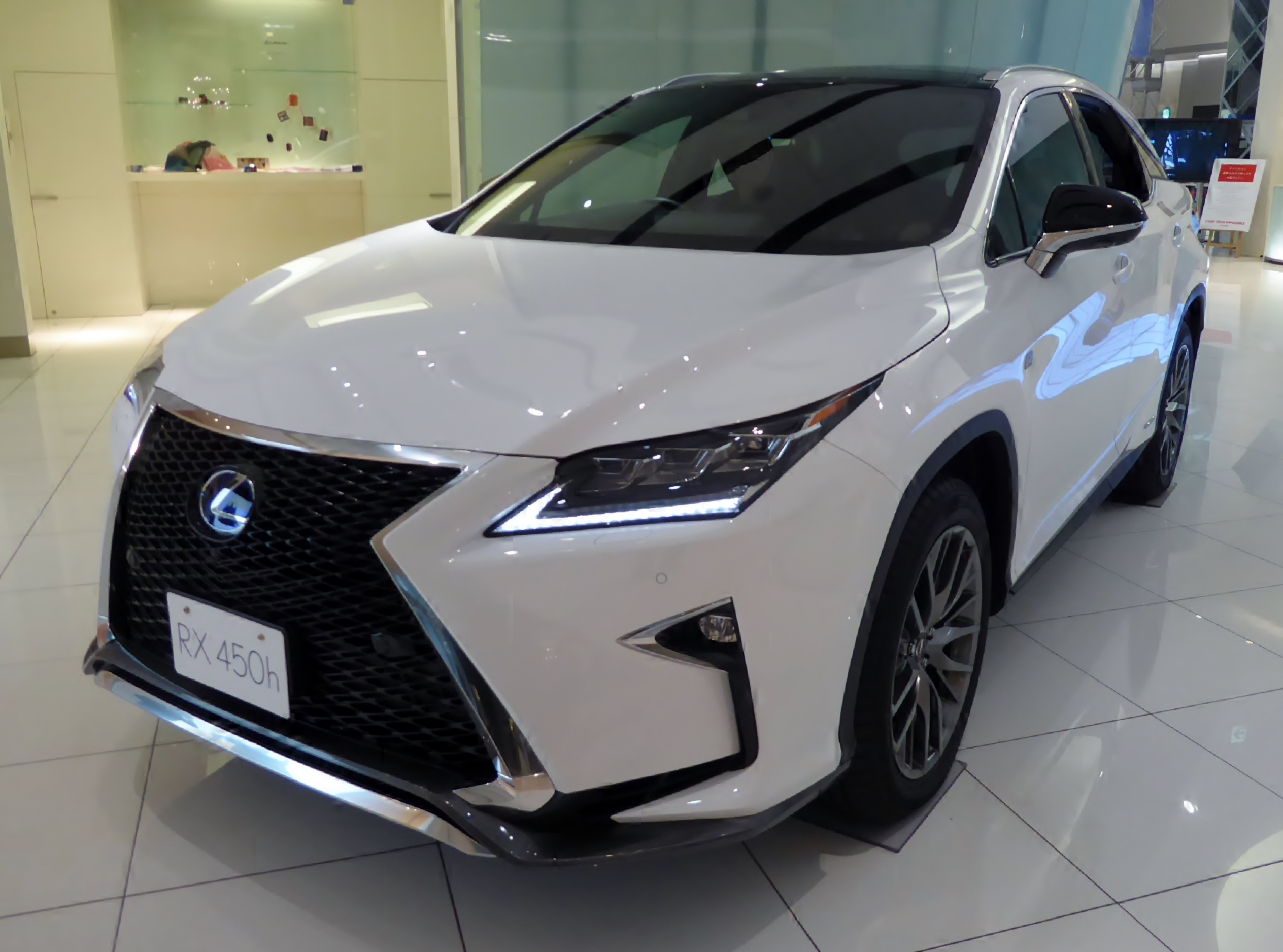 DAA-GYL25W-AWXGB型レクサス・RX450h"F SPORT"をフロントから撮影。